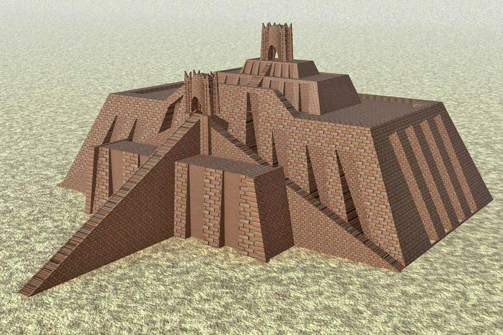 Reconstrucción informática del Zugurat de Ur-Nammu, actualmente situado a las afueras de Nasiriyah y construido a principios del siglo XXI adC